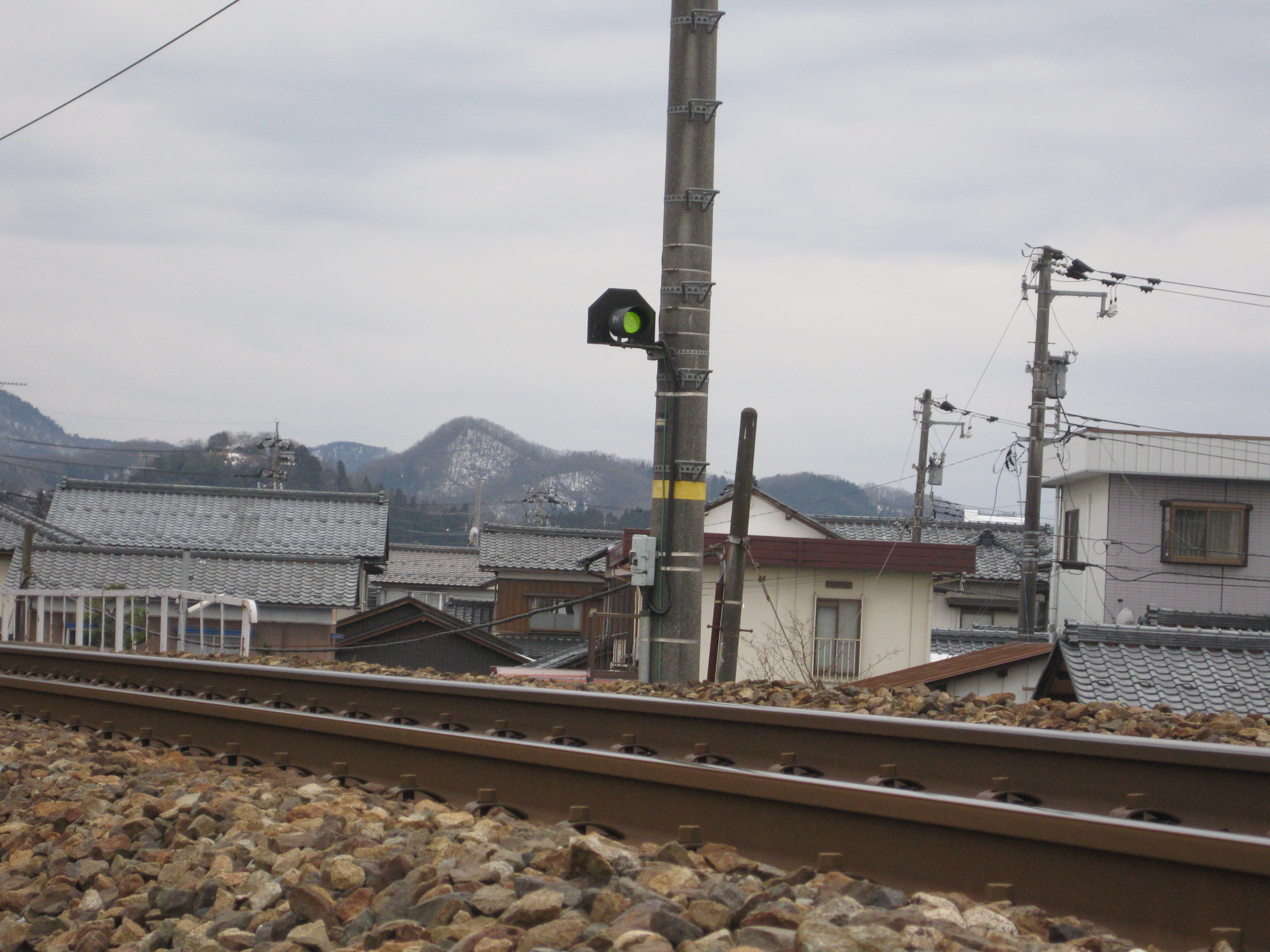 列車接近警報装置です